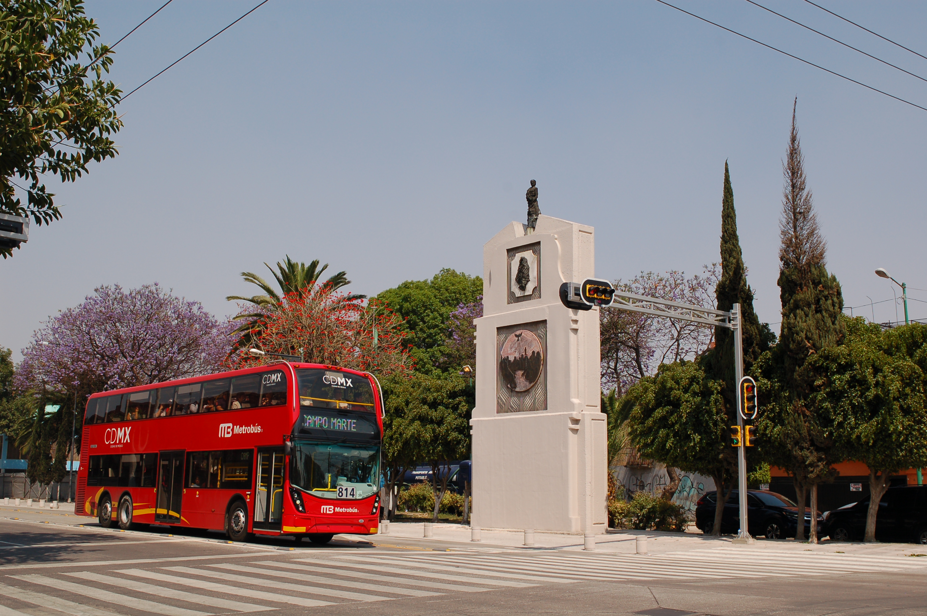 Metrobús de línea 7 sobre Calzada de los Misterios